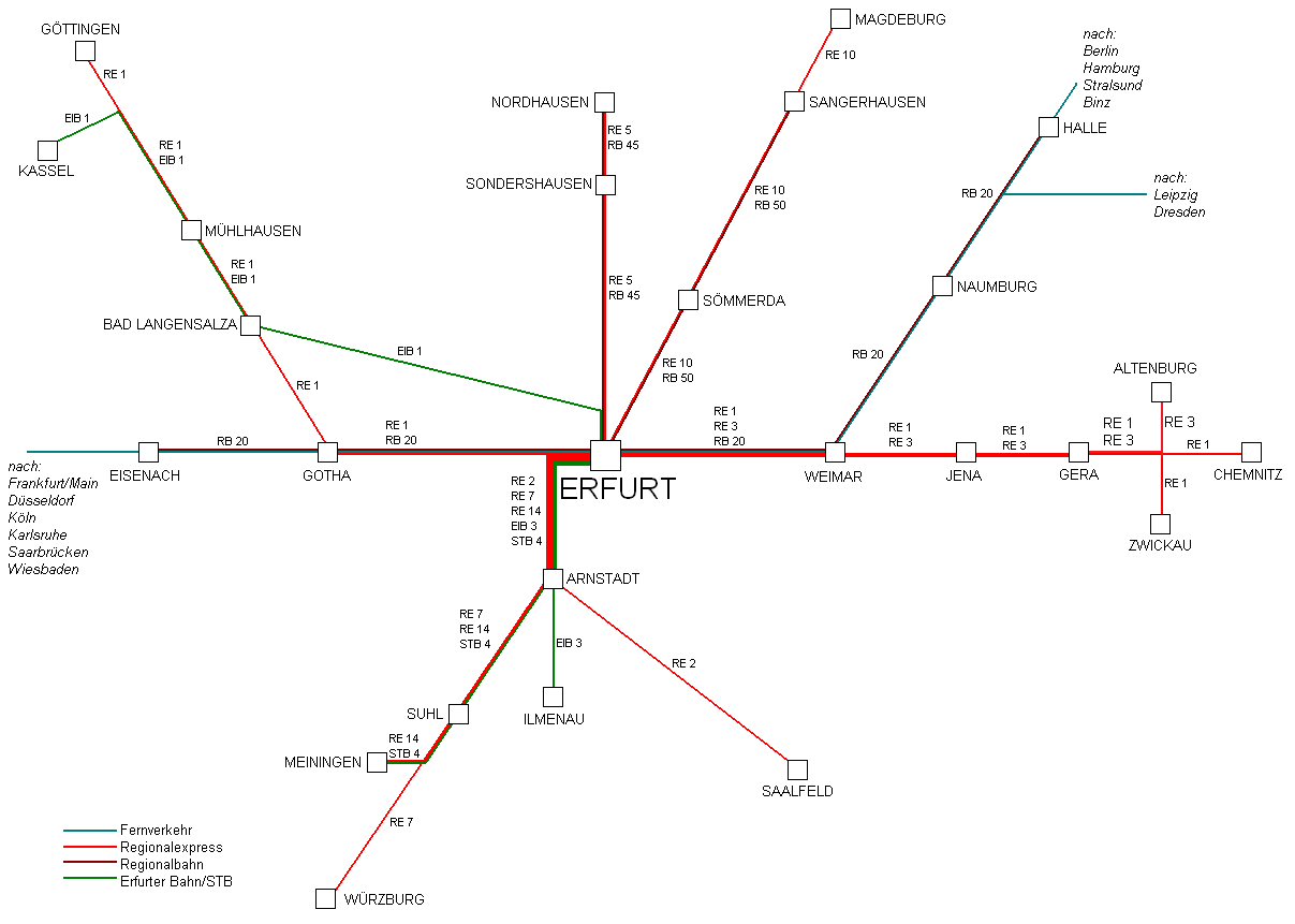 Bahnlinien durch Erfurt